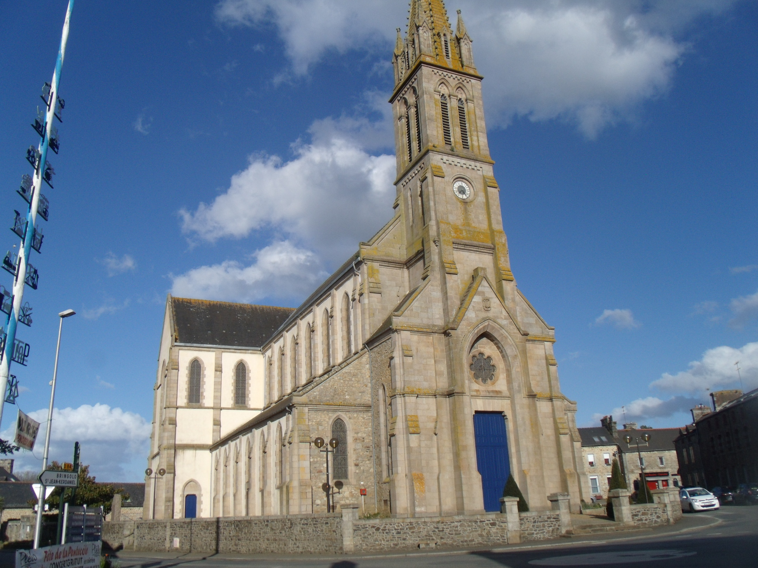 L'Eglise Saint-Pierre-et-Saint-Paul de Plélo en mai 2015.